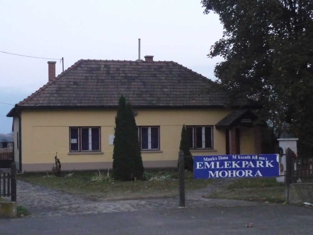 A Mikszáth Kálmán Emlékpark Mohorán (Nógrád megye, Magyarország)